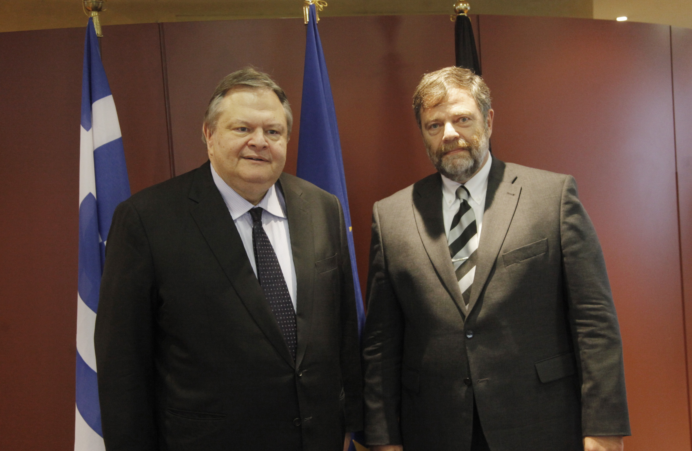 Ο Αντιπρόεδρος της Κυβέρνησης και Υπουργός Εξωτερικών, Ευάγγελος Βενιζέλος, παρέθεσε αποχαιρετιστήριο γεύμα την Τρίτη 28 Ιανουαρίου στο Υπουργείο Εξωτερικών προς τιμήν του Πρέσβη της Ομοσπονδιακής Δημοκρατίας της Γερμανίας, Wolfgand Dold. (Πηγή: ΕΥΡΩΚΙΝΗΣΗ)